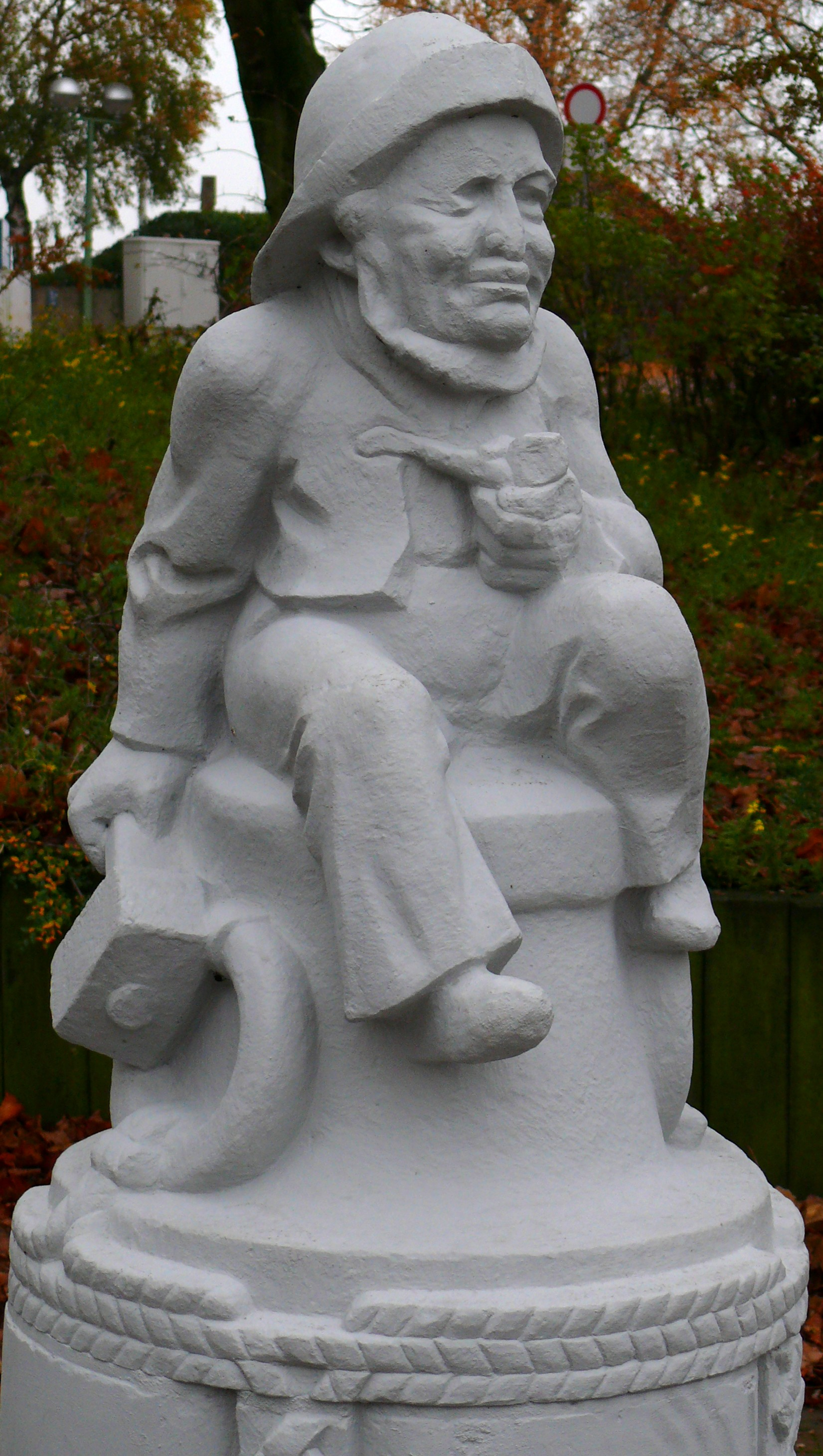 Klabautermann vor dem Restaurant "Der Wasserschout" in der Nähe des Deutschen Schiffahrtsmuseums Bremerhaven